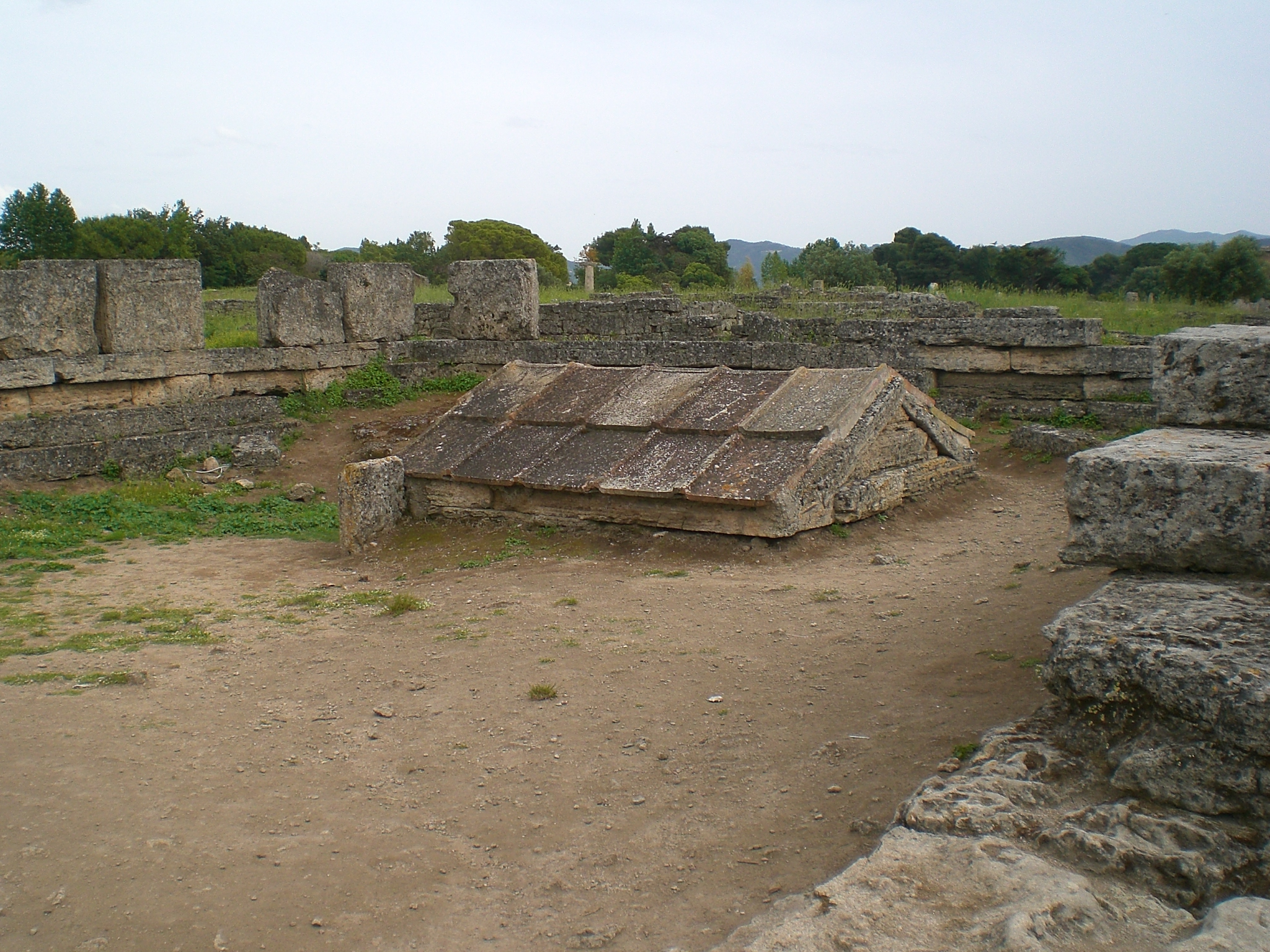 Heeron (cosidetto Sacello ipogeico) dell'area archeologica di Paestum